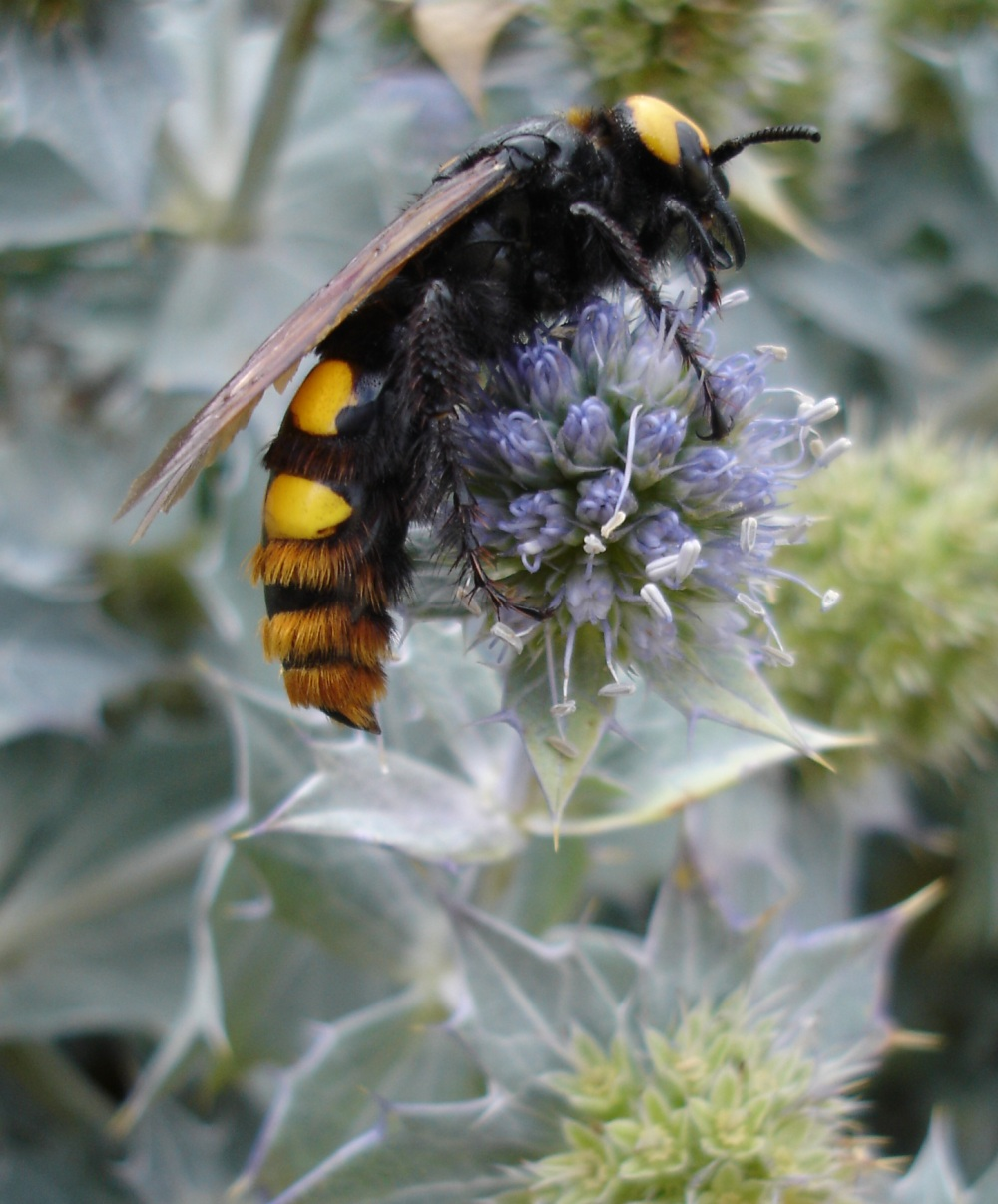 Scolia maculata, Cap de L'Homy Plage (Landes)